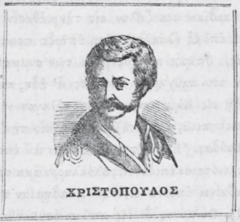 Athanasios Christopoulos, Griechischer Poet